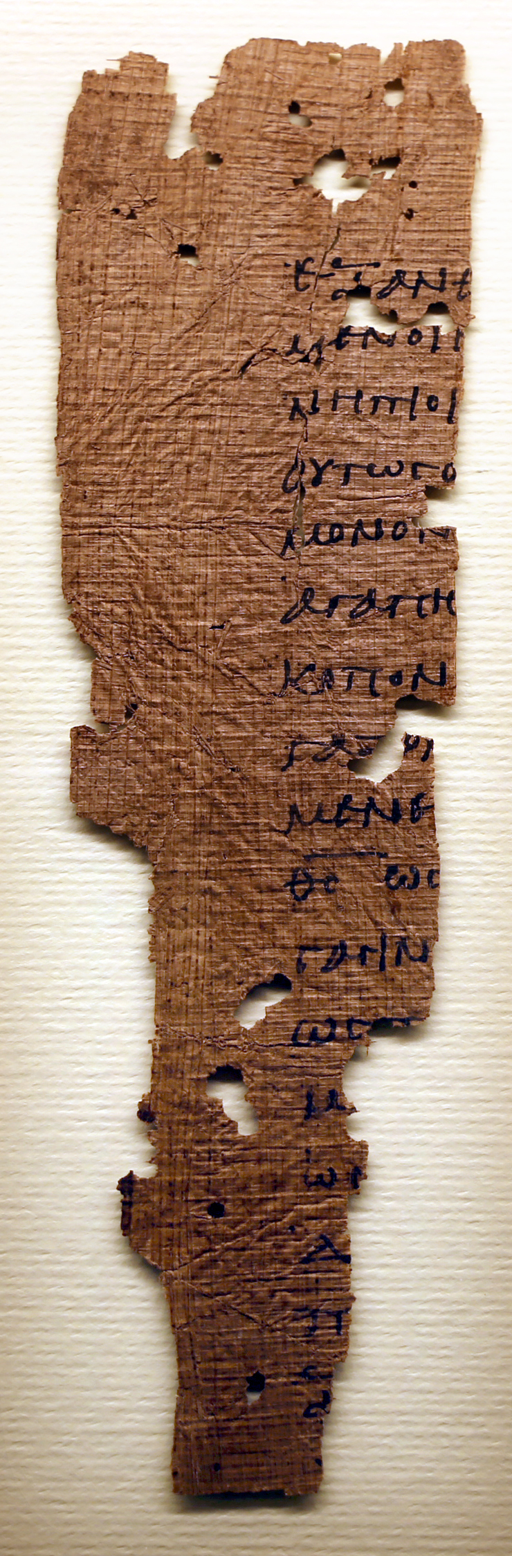 L'Egitto di Santa Caterina Special Exhibition (Bagno a Ripoli 2017) This is a photo of a monument which is part of cultural heritage of Italy.